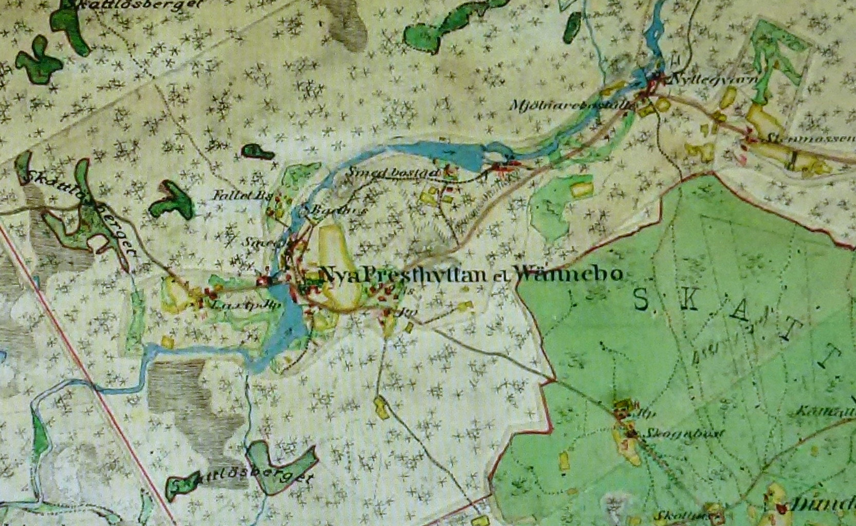 Nya Prästhyttan, häradskartan 1866-1867